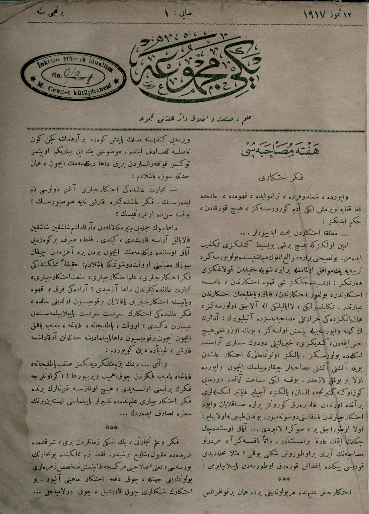 Yeni Mecmua, Ziya Gökalp öncülüğünden yayımlanmış olan ilim, fikir, sanat ve edebiyat dergisidir.